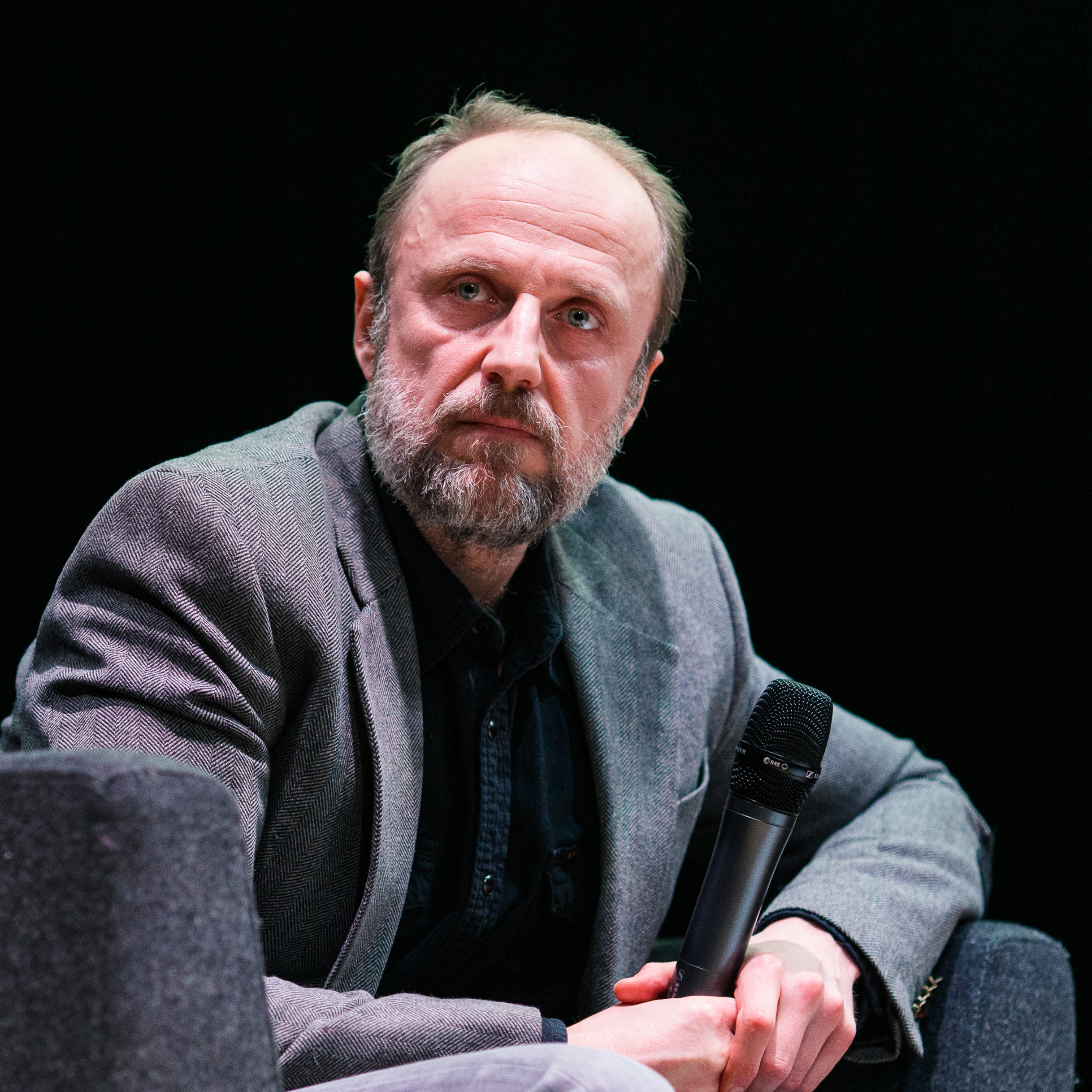 Łukasz Simlat podczas spotkania w CBK FAMA we Wrocławiu, 2020